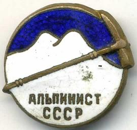 Изображение значка, вручаемого альпинистам, выполнившим норматив